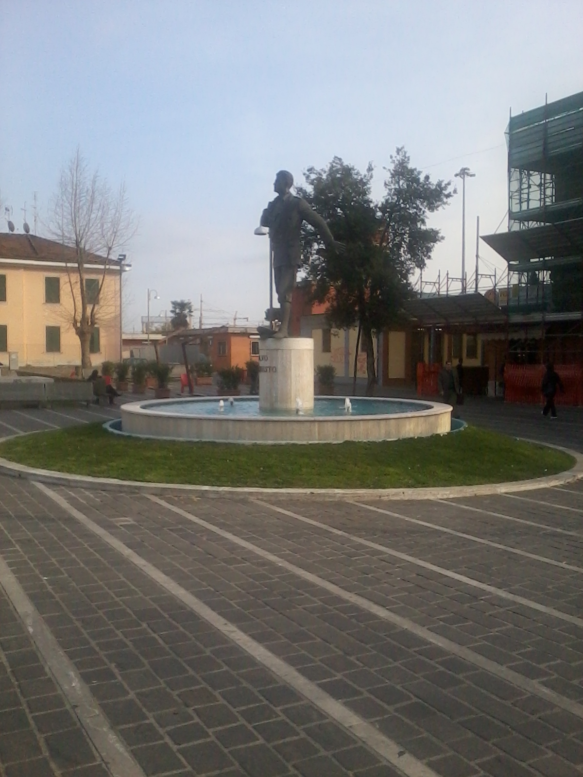 Il monumento a Salvo d'Acquisto a Cisterna di Latina